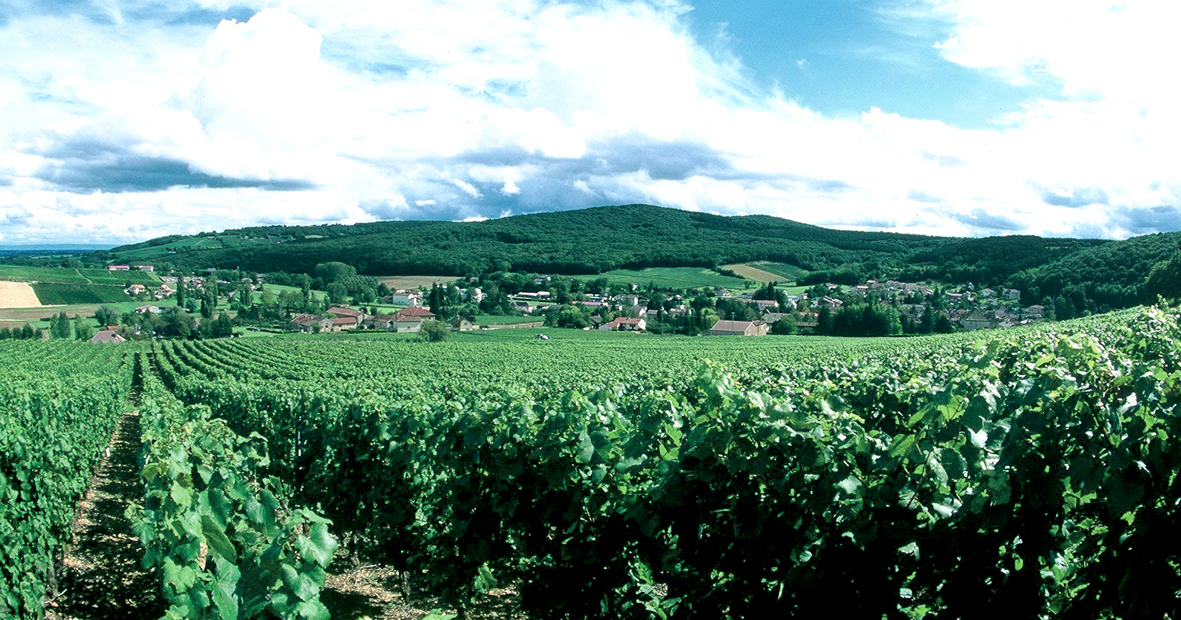 Paysage typique du Haut-Mâconnais. Photographie prise à Lugny.